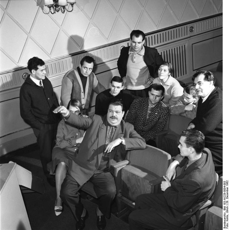 Zentralbild-Kohls 28.12.1962 Zum VI. Parteitag der SED: Fußballer des TSC auf vorbildlichem Weg Ein Arbeitsprogramm zumVI. Parteitag, dessen Erfüllung der Dank des Kollektivs an die Partei für die erwiesene Unterstützung sein soll, haben die Fußballer des TSC Oberschöneweide beschlossen. Darin verpflichten sich Spieler und Funktionäre unter anderem, alle zumVI. Parteitag herausgegebnenen Dokumente zu studieren und in Seminaren strittige Fragen zu behandeln. Die älteren und leistungsstarken Spieler wollen in Zukunft den jüngeren helfen, das Niveau der Besten zu erreichen. Die Sportfreunde Grunst und Uhden übernehmen das Training der Knaben- und Schülermannschaften. Weiterhin ist beabsichtigt, mit den Frauen Theateraufführungen zu besuchen und die freundschaftlichen Kontakte mit dem Maxim-Gorki-Theater zu erweitern. UBz.: Bei dieser Probenpause trat der vor kurzem zwischen dem Maxim-Gorki-Theater und der Sektion Fußball des TSC Oberschöneweide abgeschlossenen Freundschaftsvertrag in Aktion. Aufmerksam folgen die Spieler des TSC Meyer (2. Reihe sitzend- links), Wühn (reschts daneben und Schunack (1. Reihe -rechts) den Ausführungen des bekannten Schauspielers Ehlers (vorn sitzend). Auch Intendant Prof. Maxim Vallentin (2.Reihe rechts) und weitere Schauspieler gaben ihren Gästen einen kleinen Einblick in das Theaterleben.